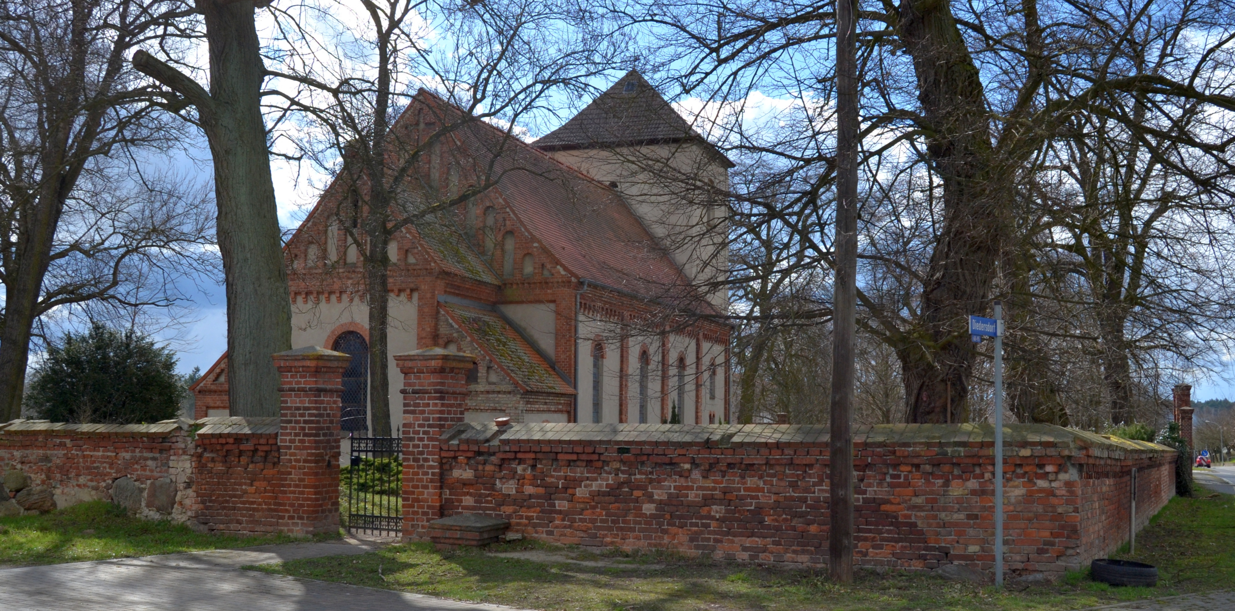 Fotoprojekt – Zwischen Berlin und Oder 2015 Photo project “Between Berlin and River Oder 2015” This template will categorize into Category:Zwischen Berlin und Oder 2015.